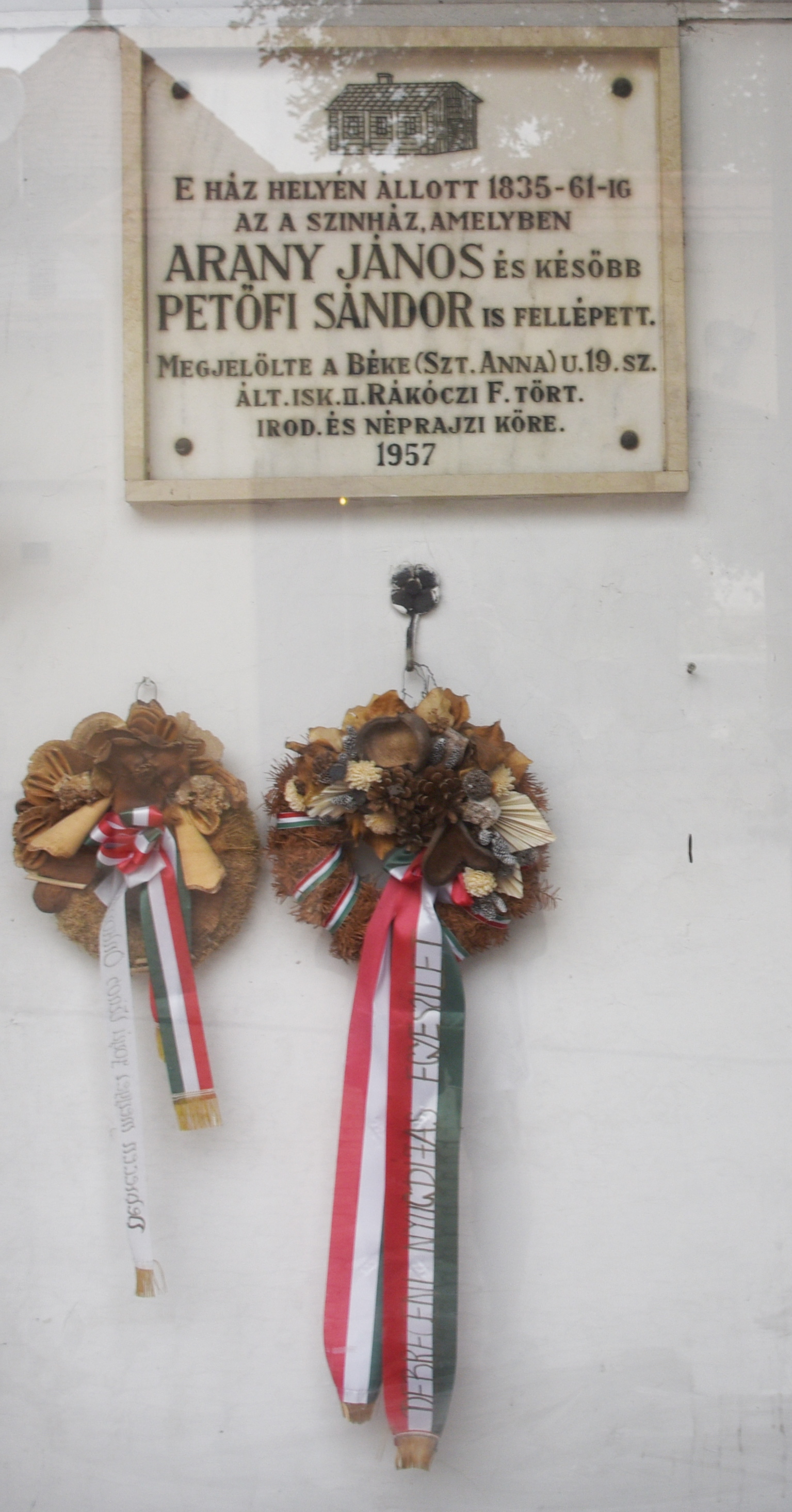 Gedenktafel Janos Arany und Sandor Petöfi - Arany Janos und Petöfi Sandor